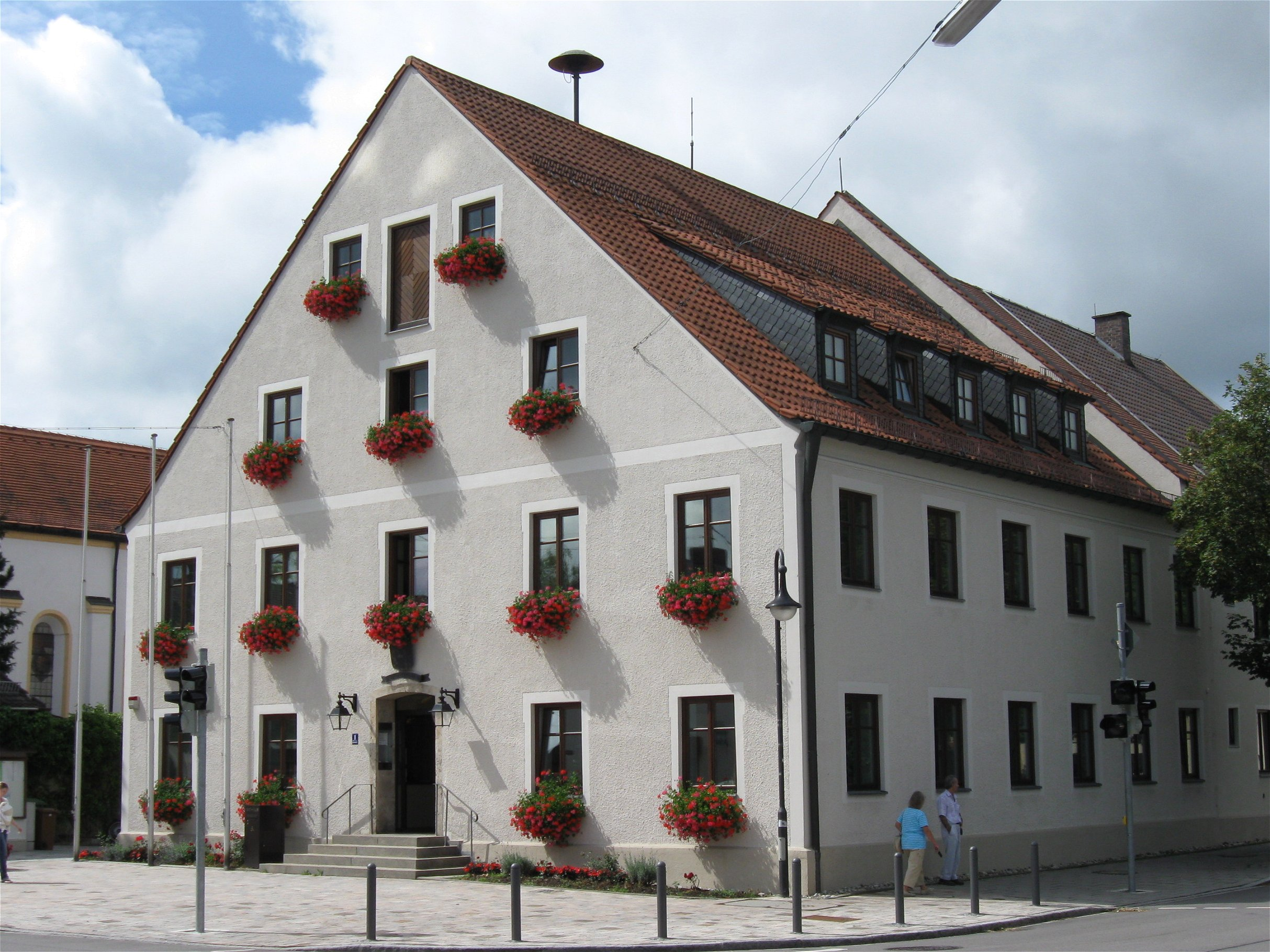 Pfarrer-Wenk-Platz 1; Rathaus, Ehemaliger Pfarrhof, dann Rathaus. Stattlicher Satteldachbau mit barocken Putzgliederungen, 1725. D-1-84-129-2